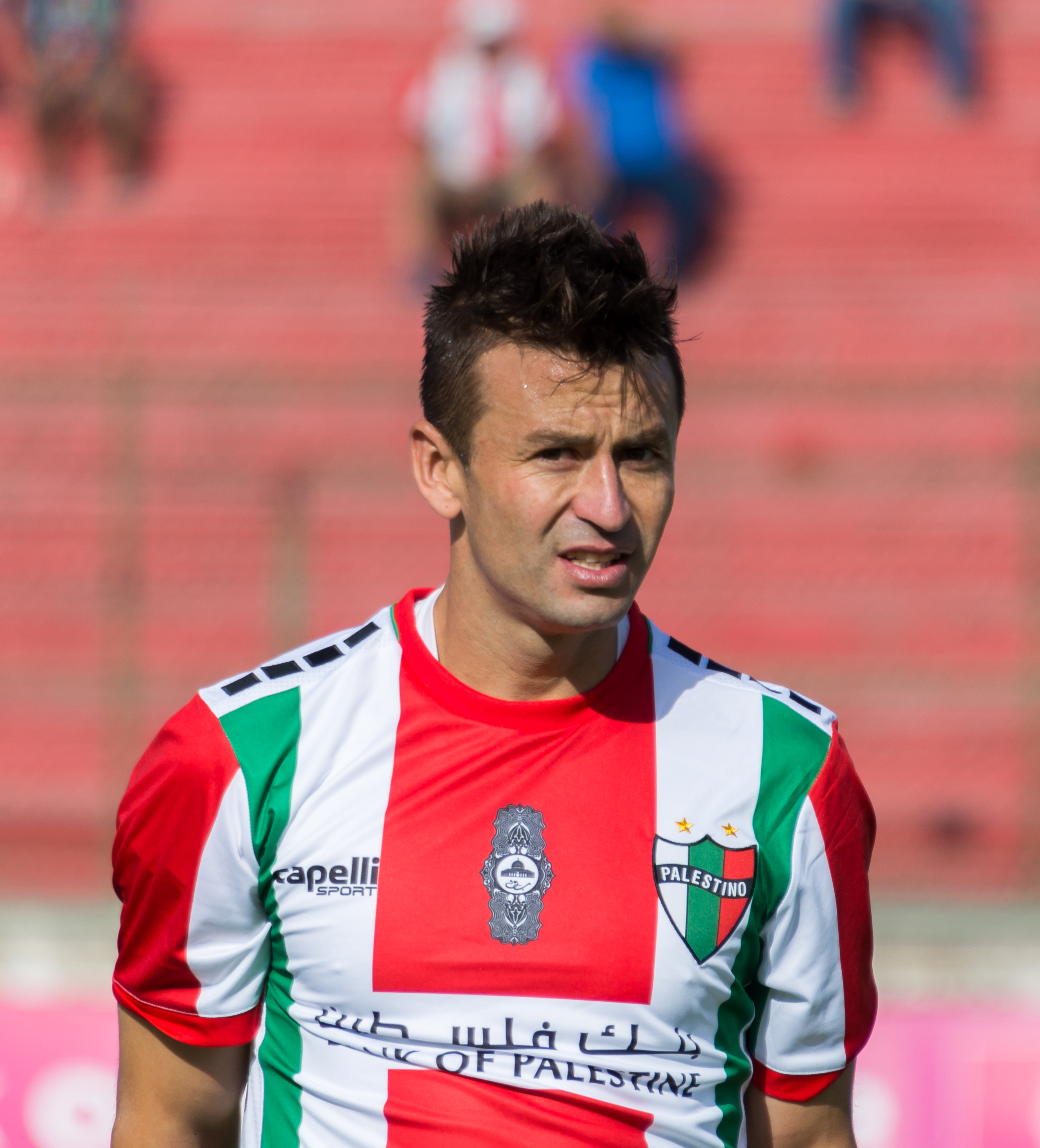 Roberto Gutiérrez, Palestino v Universidad de Concepción, Estadio Municipal de La Cisterna, La Cisterna, Santiago, Región Metropolitana, Chile.